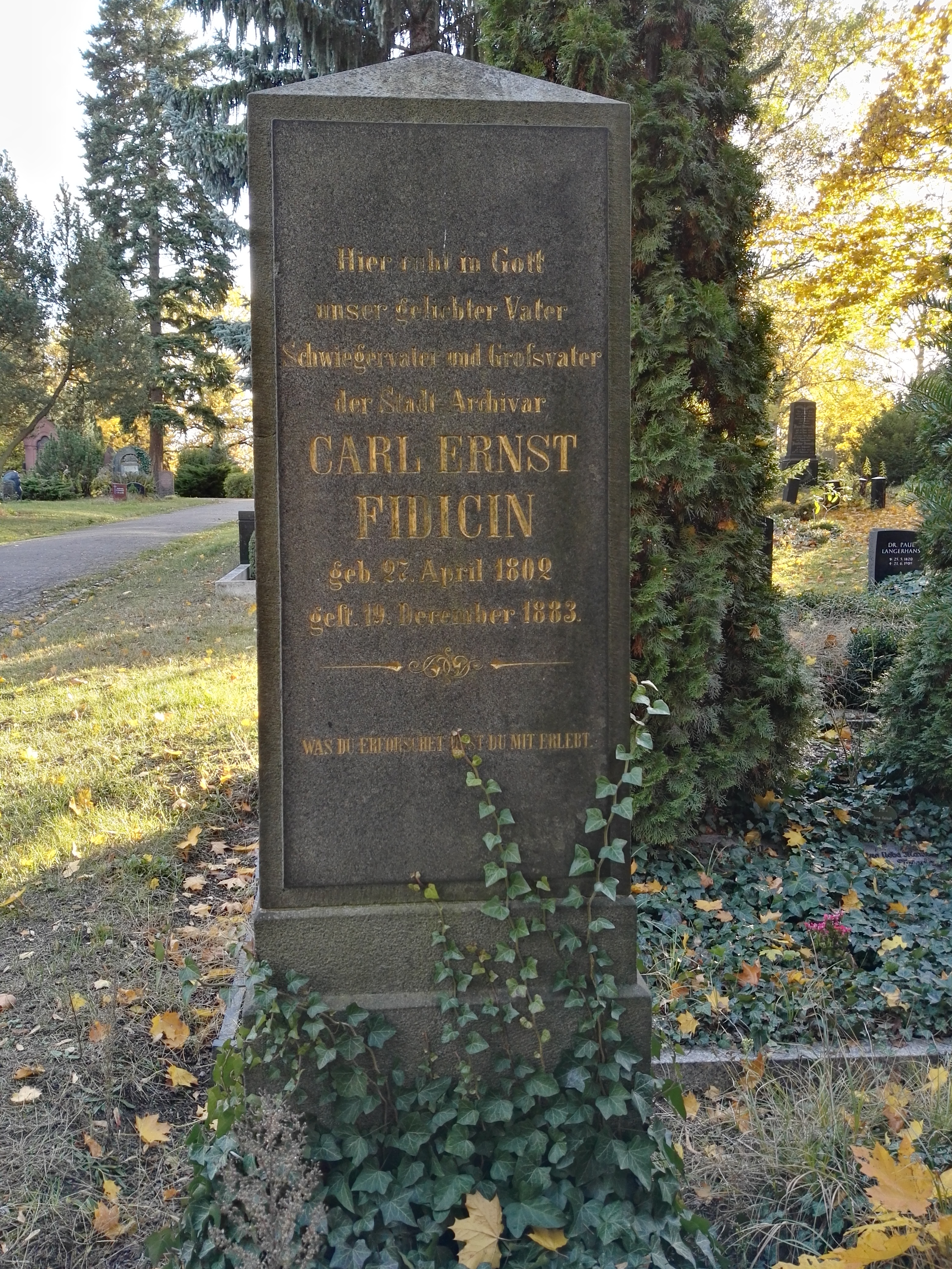 Grab von Ernst Fidicin auf dem Luisenstädtischen Friedhof in Berlin-Kreuzberg; ehemaliges Ehrengrab